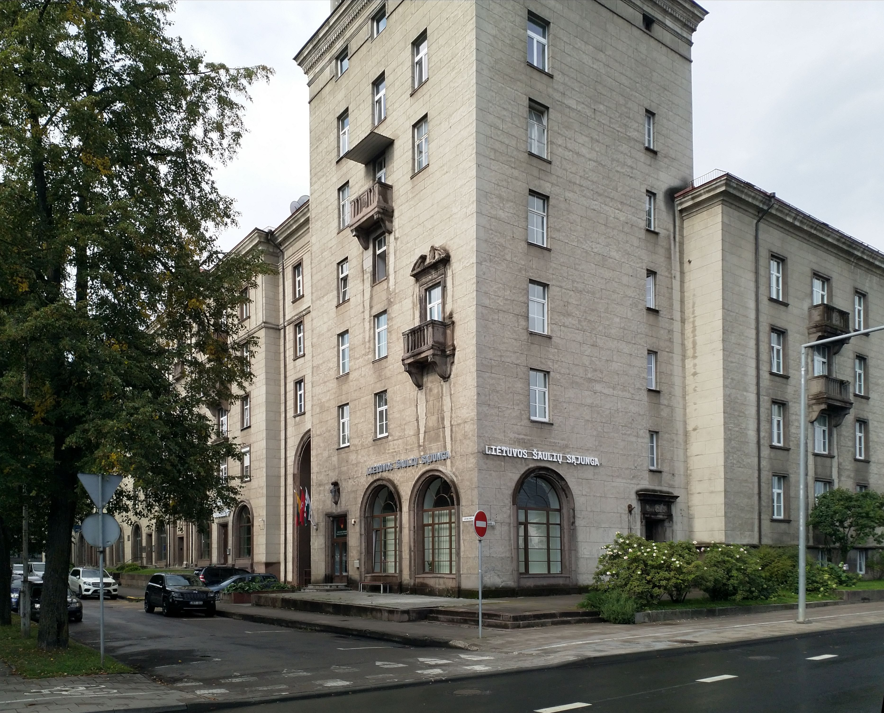 Lietuvos šaulių sąjungos būstinė Vilniuje, Vašingtono aikštėje